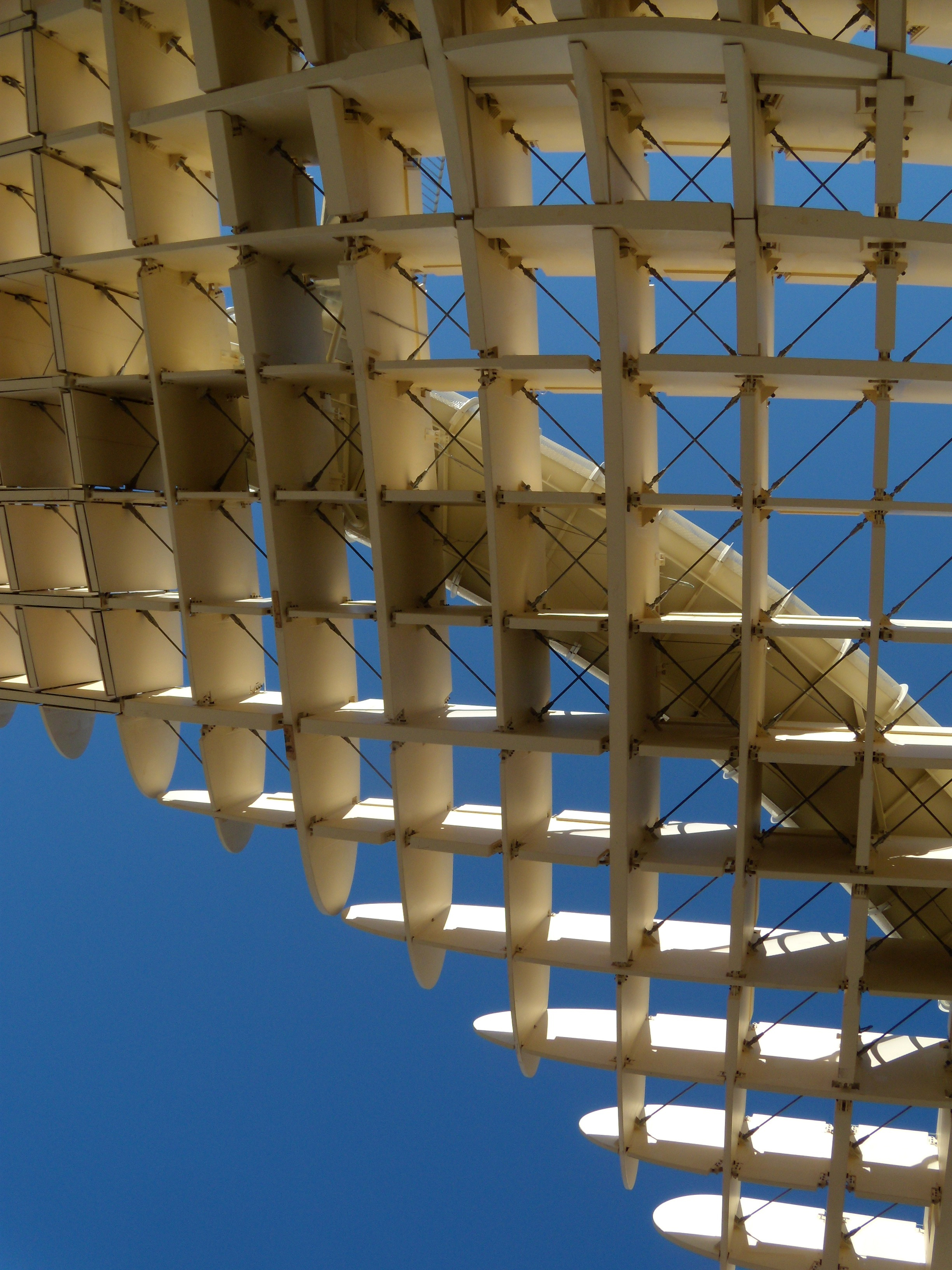 Détail de la structure de Metropol Parasol, sur la place de la Encarnacíon de Séville (Espagne)